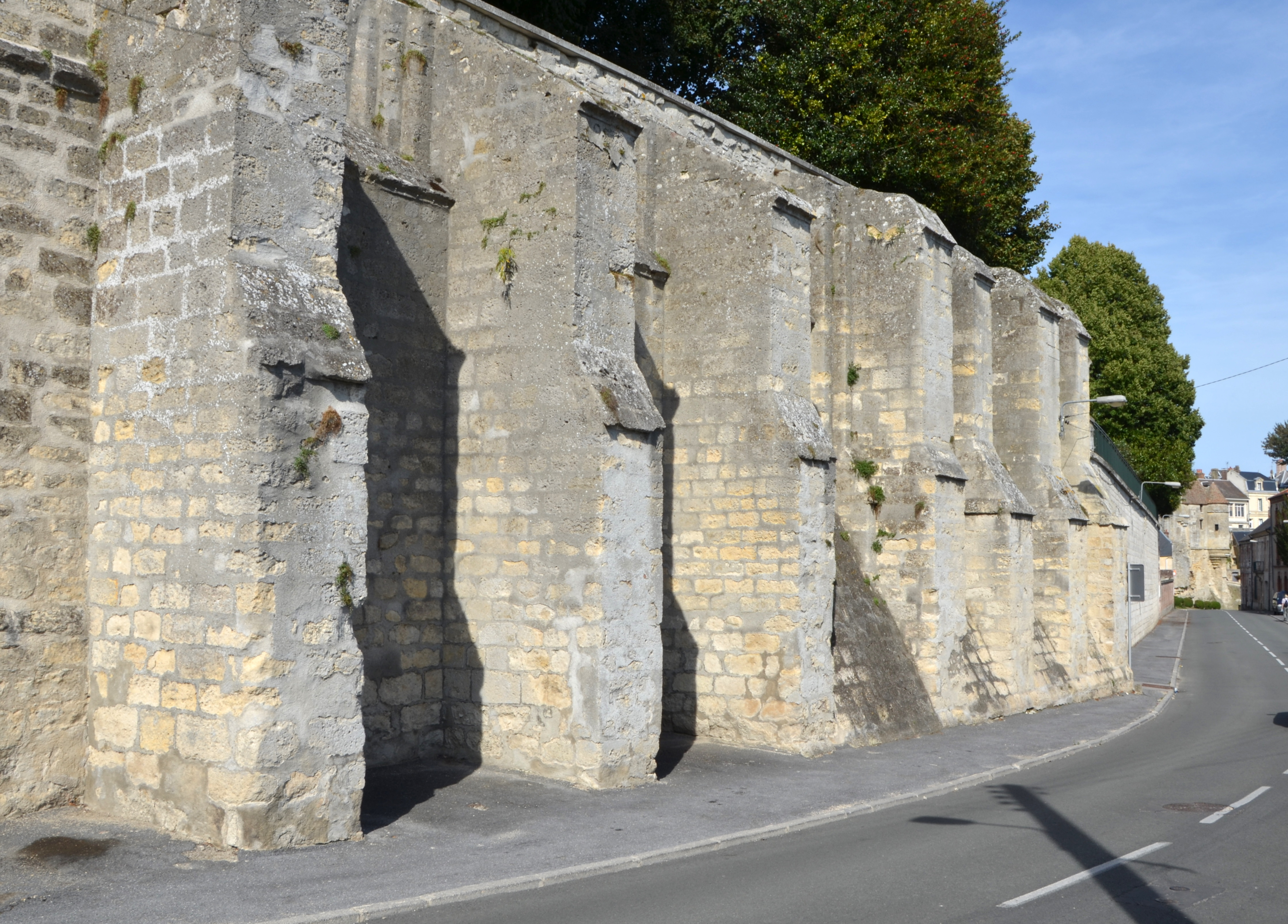 Vestiges de l'église Notre-Dame-la-Profonde de Laon (Aisne, France). .